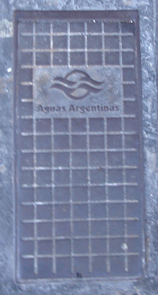 Tapa de la red de agua corriente de la Ciudad de Buenos Aires con el logo de la antigua concesionaria Aguas Argentinas.